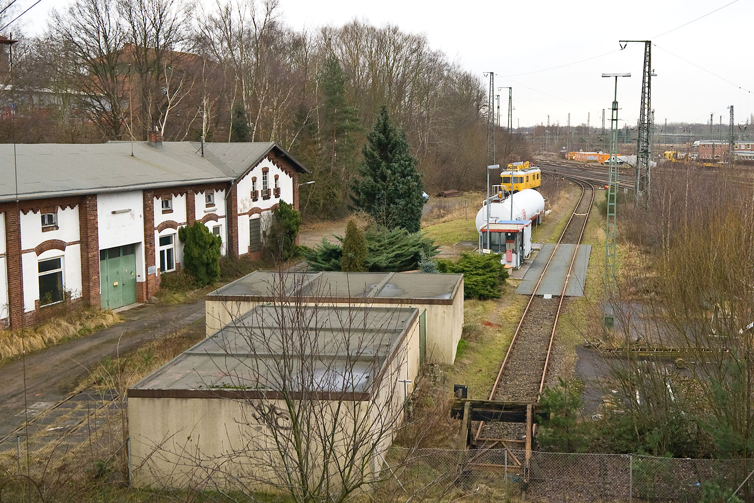 Vom 1960 aufgelösten Bahnbetriebswerk Lüneburg sind ein Gebäude und ein Teil der Gleise erhalten geblieben. Die südliche Geländehälfte des ehemaligen Bahnbetriebswerkes wird von der DB Netz genutzt. Im erhaltenen Gebäude links ist die Fahrleitungsmeisterei Lüneburg untergebracht. Am Gleis in Bildmitte befinden sich eine Tankstelle und eine Wasserfüllanlage. Im Hintergrund ist ein Turmtriebwagen der Betriebswerkstatt abgestellt.